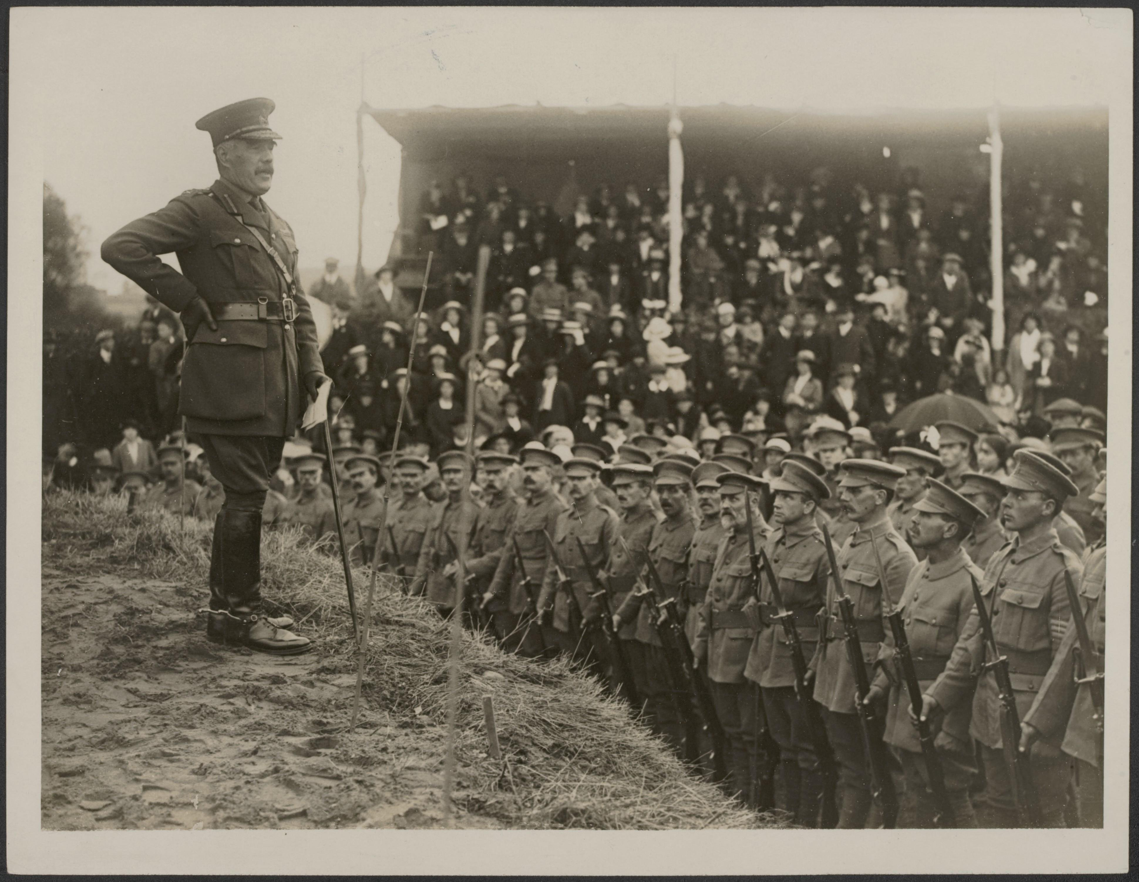 Collectie / Archief : Fotocollectie Eerste Wereldoorlog Reportage / Serie : [ onbekend ] Beschrijving : General Sir William Robertson, chief of the Imperial General Staff, unveiling a village War Cross at Dalderby, Lincolnshire - This village has sent the largest percentage of men to the army of any village in the country. Annotatie : Onthulling door sir William Robertson, chef van de Engelse generale staf, van een Oorlogskruis in Dalderby, Lincolnshire. Dit dorp heeft percentueel het grootste aantal mannen onder de wapenen van alle dorpen in het land. Datum : {1914-1918} Locatie : Dalderby, Groot-Brittannië Trefwoorden : burgers, dorpen, eerste wereldoorlog, monumenten, officieren, soldaten Persoonsnaam : Robertson Fotograaf : Alfieri Auteursrechthebbende : Public Domain logo Materiaalsoort : Foto (zwart/wit) Nummer archiefinventaris : bekijk toegang 2.24.09 Bestanddeelnummer : 158-1934